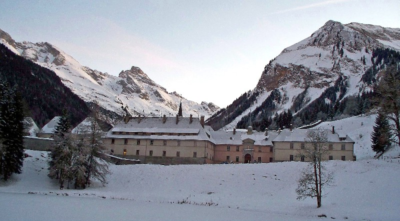 La chartreuse du Reposoir